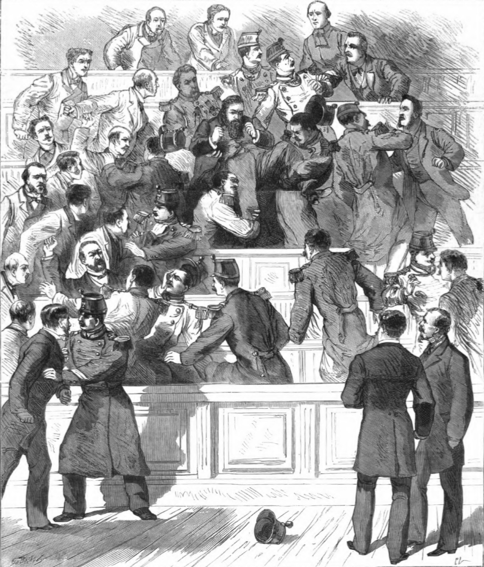 Le sandale du 11 novembre 1880 à la Chambre, M de Baudry d'Asson est expulsé.